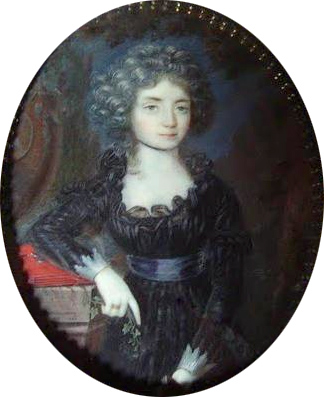 Johanna Franziksa von Hohenzollern-Sigmaringen, Fürstin zu Salm-Kyrburg (1765-1790)